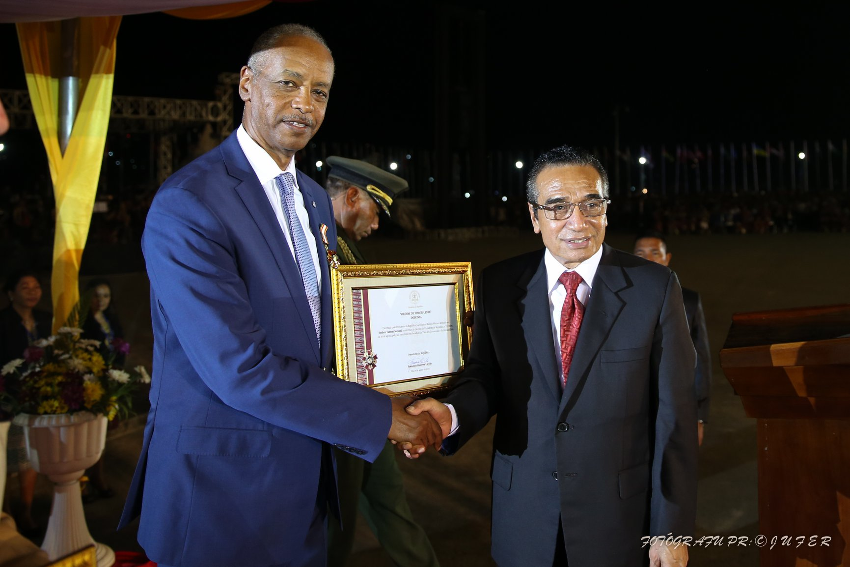 Tamrat Samuel bekommt den Ordem de Timor-Leste von Francisco Guterres bei den Feierlichkeiten zum zwanzigsten Jubiläum des Unabhängigkeitsreferendums.